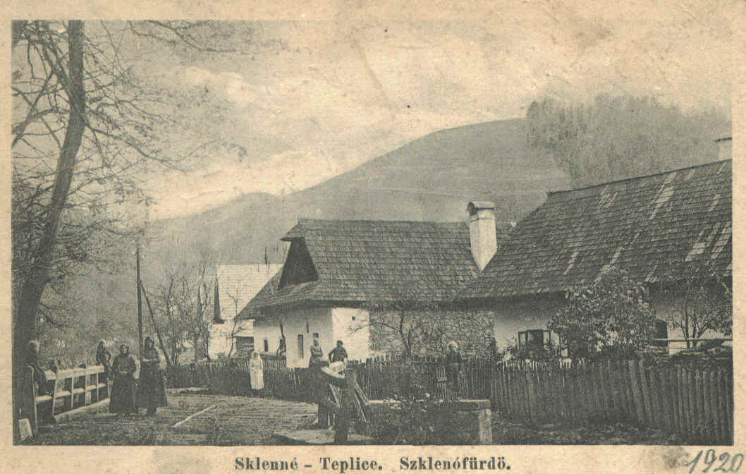 Sklené Teplice 1920